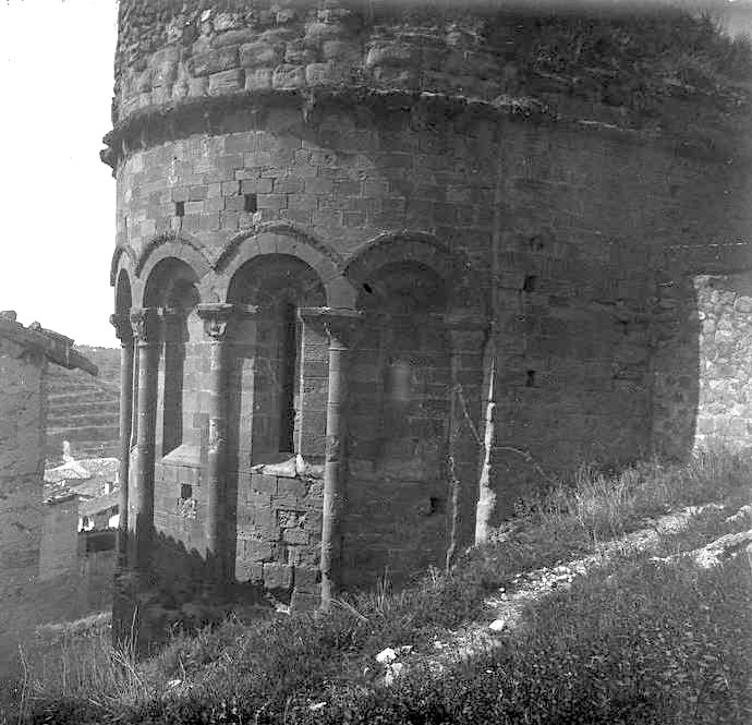 Absis de l'església vella de Camarasa. Josep Salvany i Blanch (1918)